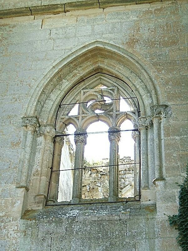 Ventanal de la iglesia del antiguo Real monasterio de Nuestra Señora de Fresdelval (Burgos)